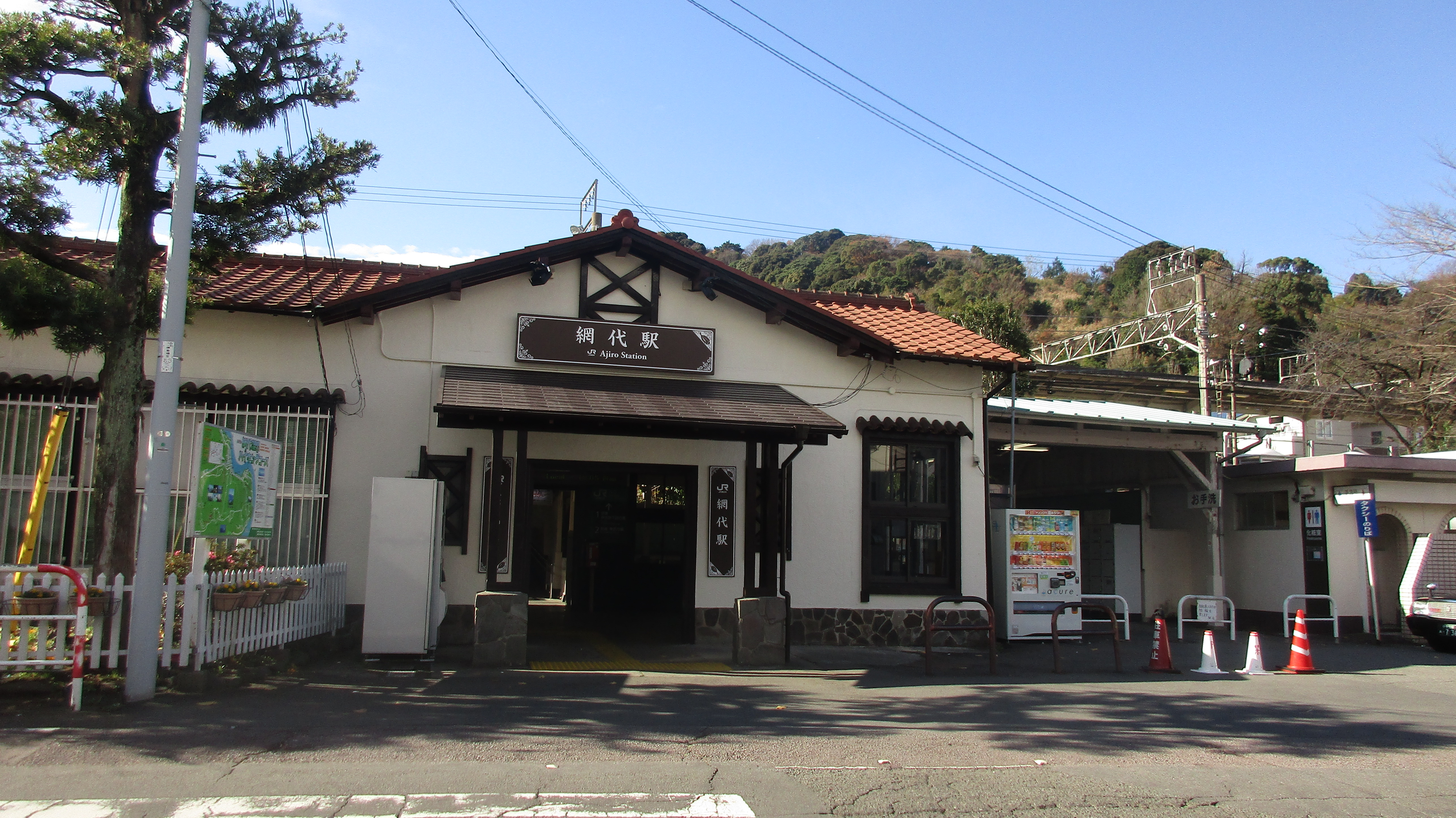 JR伊東線 網代駅舎